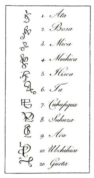 Mumeración muisca